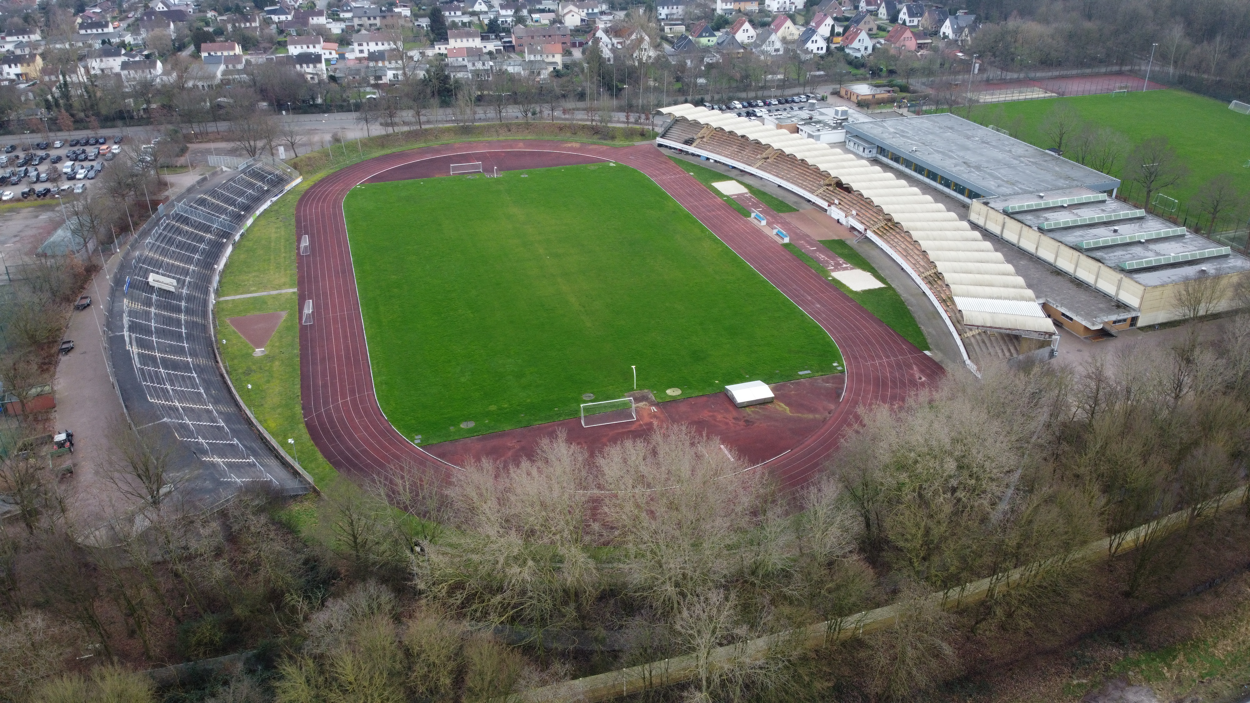 Das Nordsee-Stadion in Bremerhaven aus der Luft.